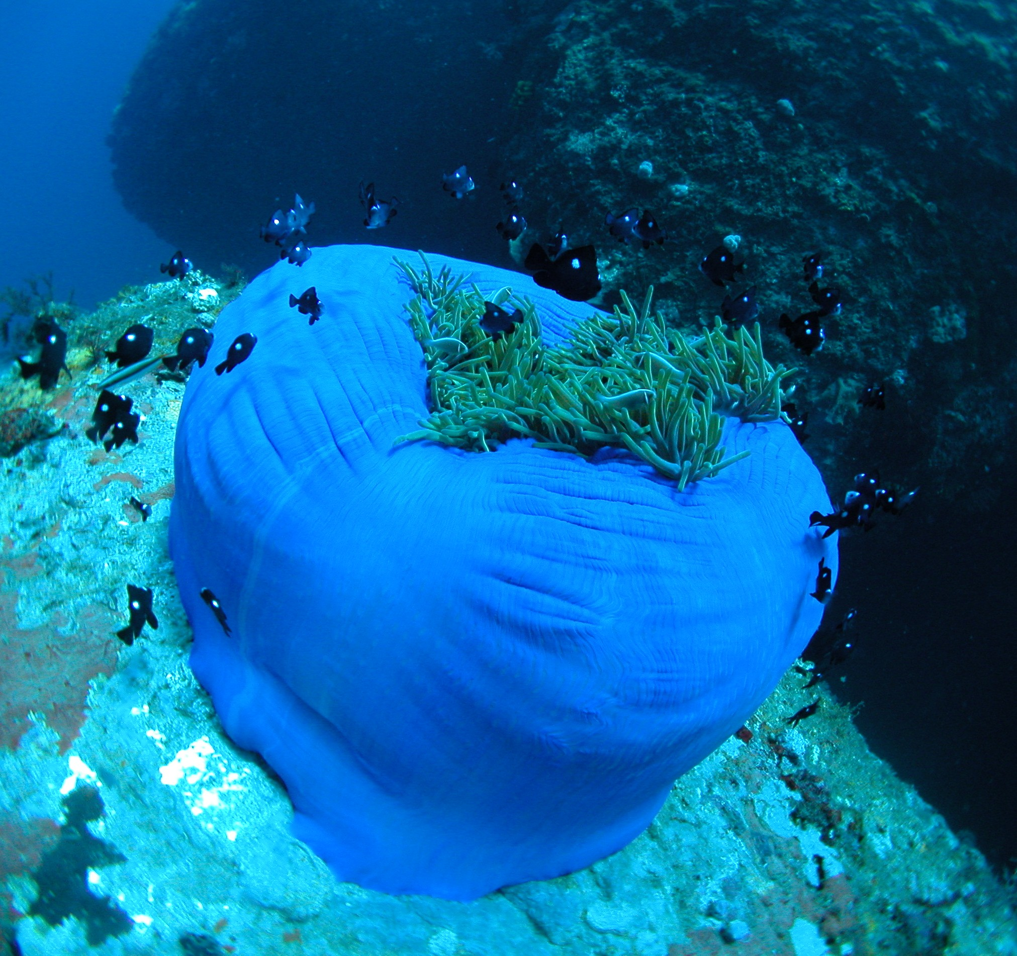 in Nha Trang, Vietnam